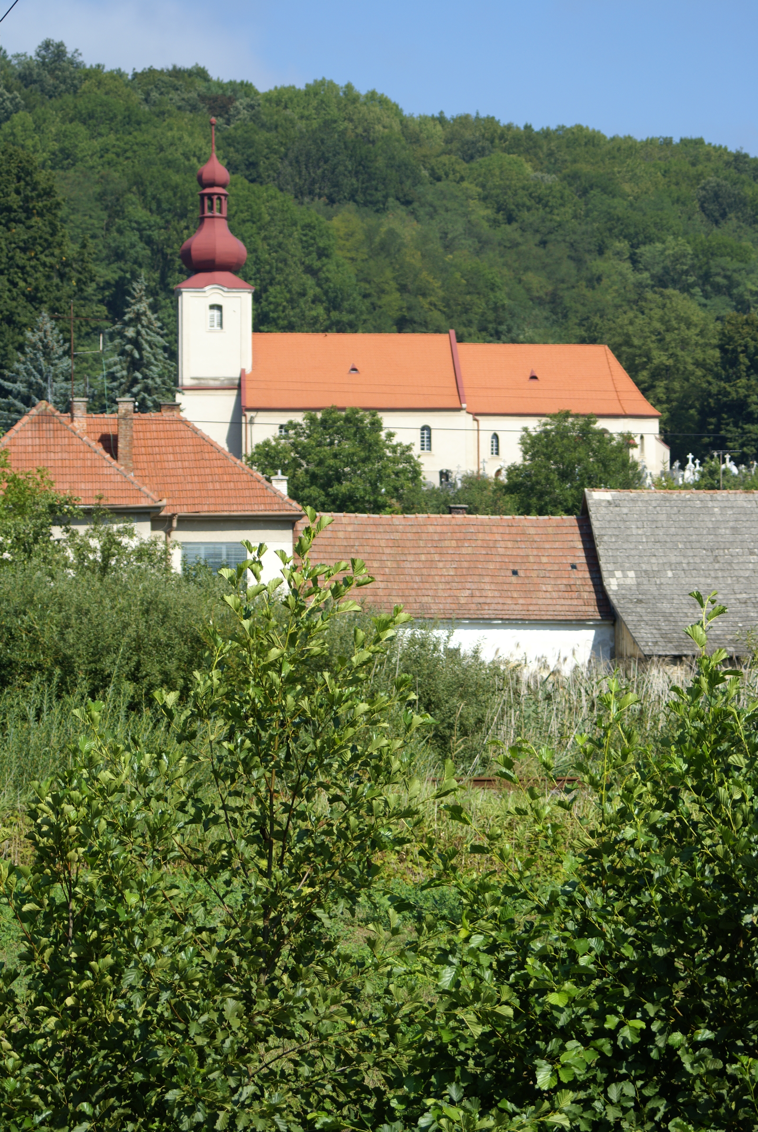 Hradište pod Vrátnom, Slovak Republic